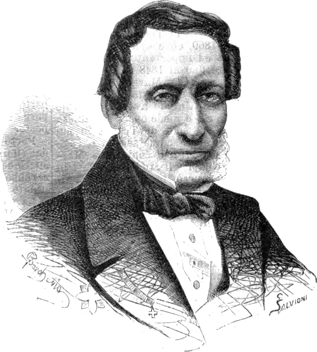 Clemente Solaro della Margarita